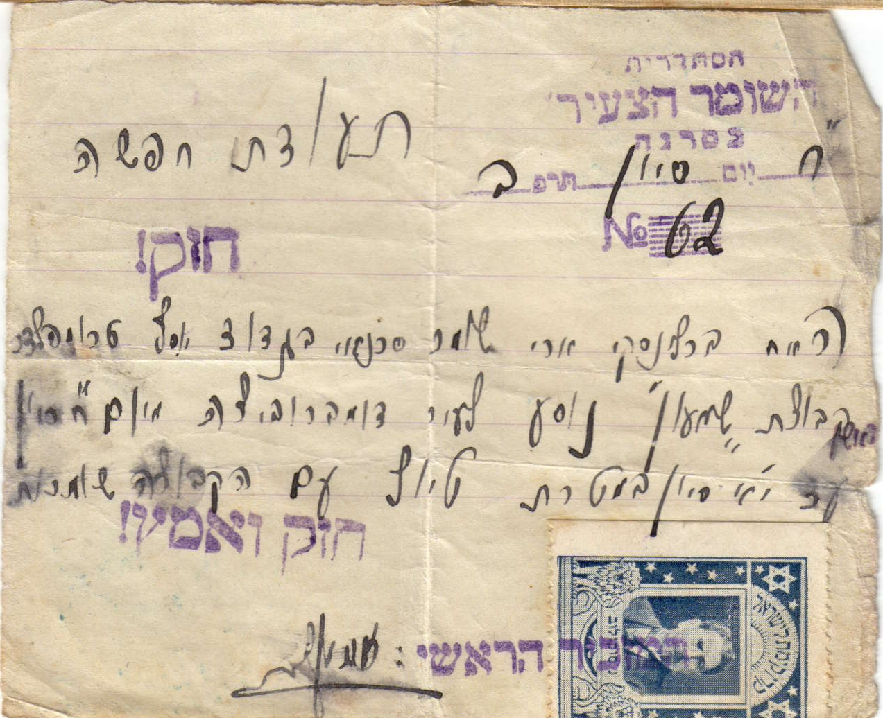 זה מסמך היסטורי שהיה שייך לסבא שלי, שעלה לארץ בשנות העשרים. הוא נמצא ברשות אבי, ויוצרי המסמך כבר אינם בחיים עשרות שנים.